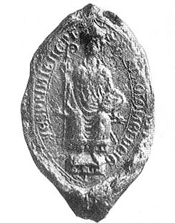 János esztergomi érsek monorú alakú trónszékes pecsétje